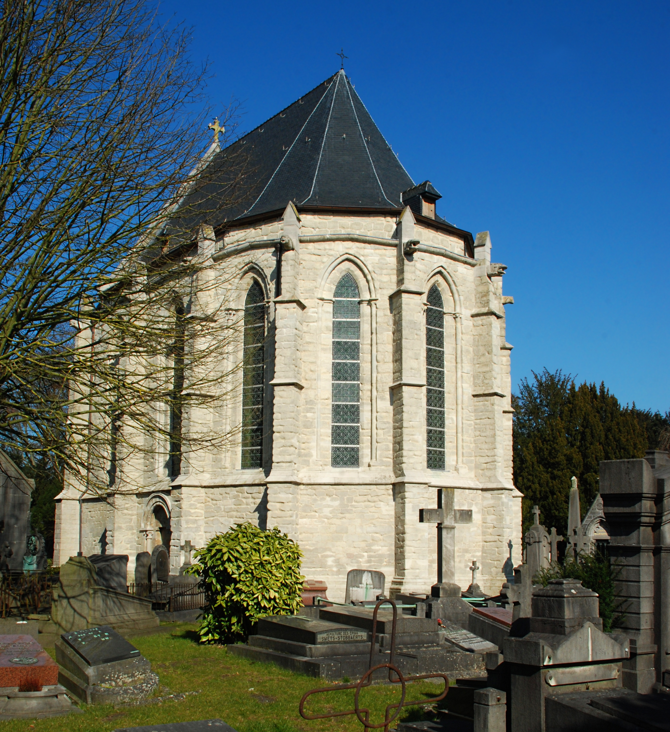 Belgique - Bruxelles - Ancienne église Notre-Dame de Laeken (gothique 13e siècle)